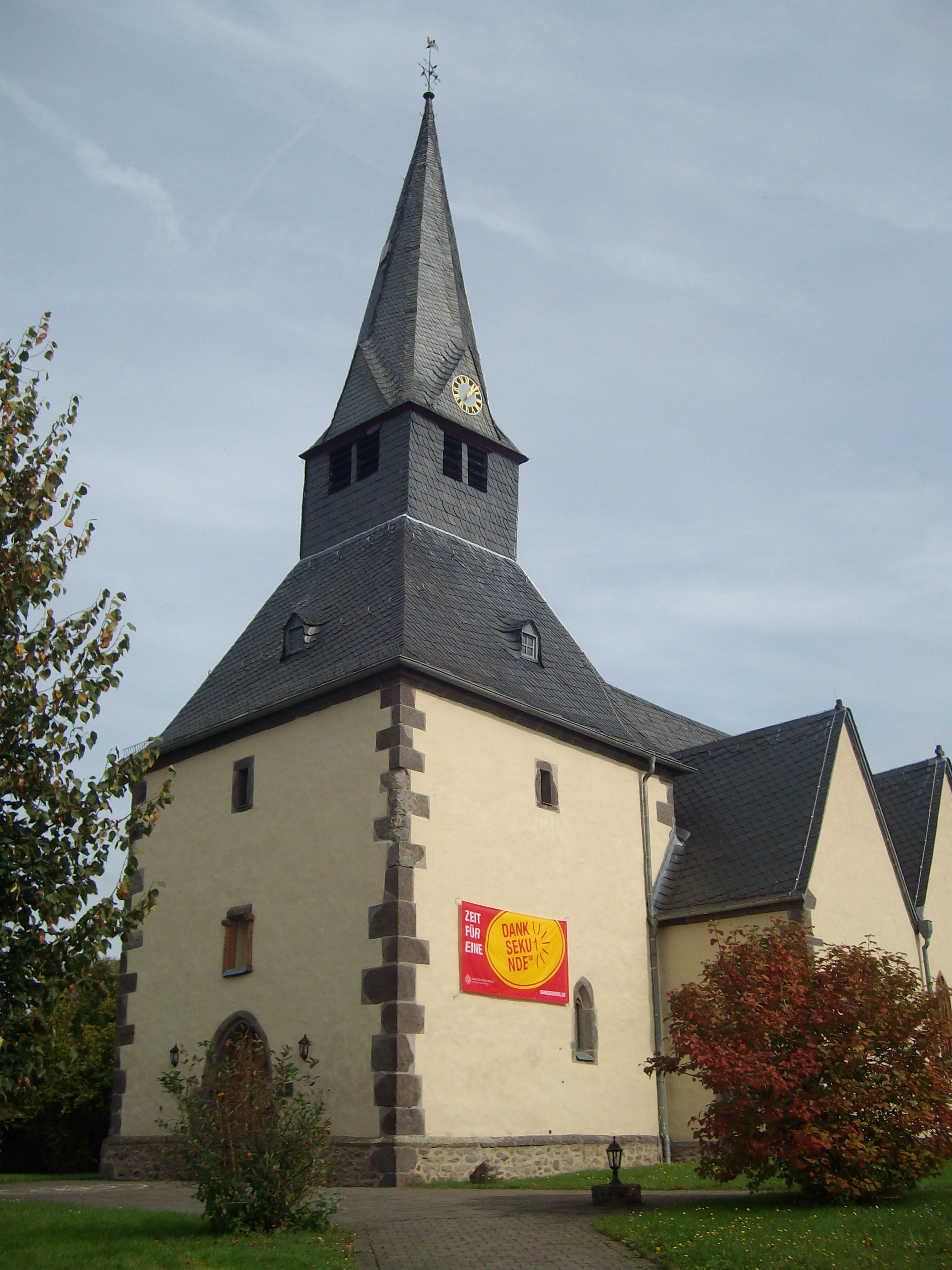 Turm der Evangelischen Kirche Münster, Laubach, Landkreis Gießen, Hessen, Deutschland